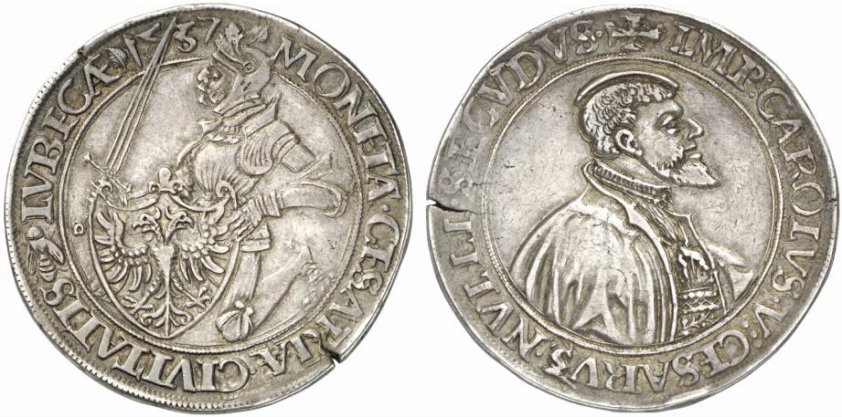 Silbermünze / Taler: Brömsentaler, Lübeck 1537